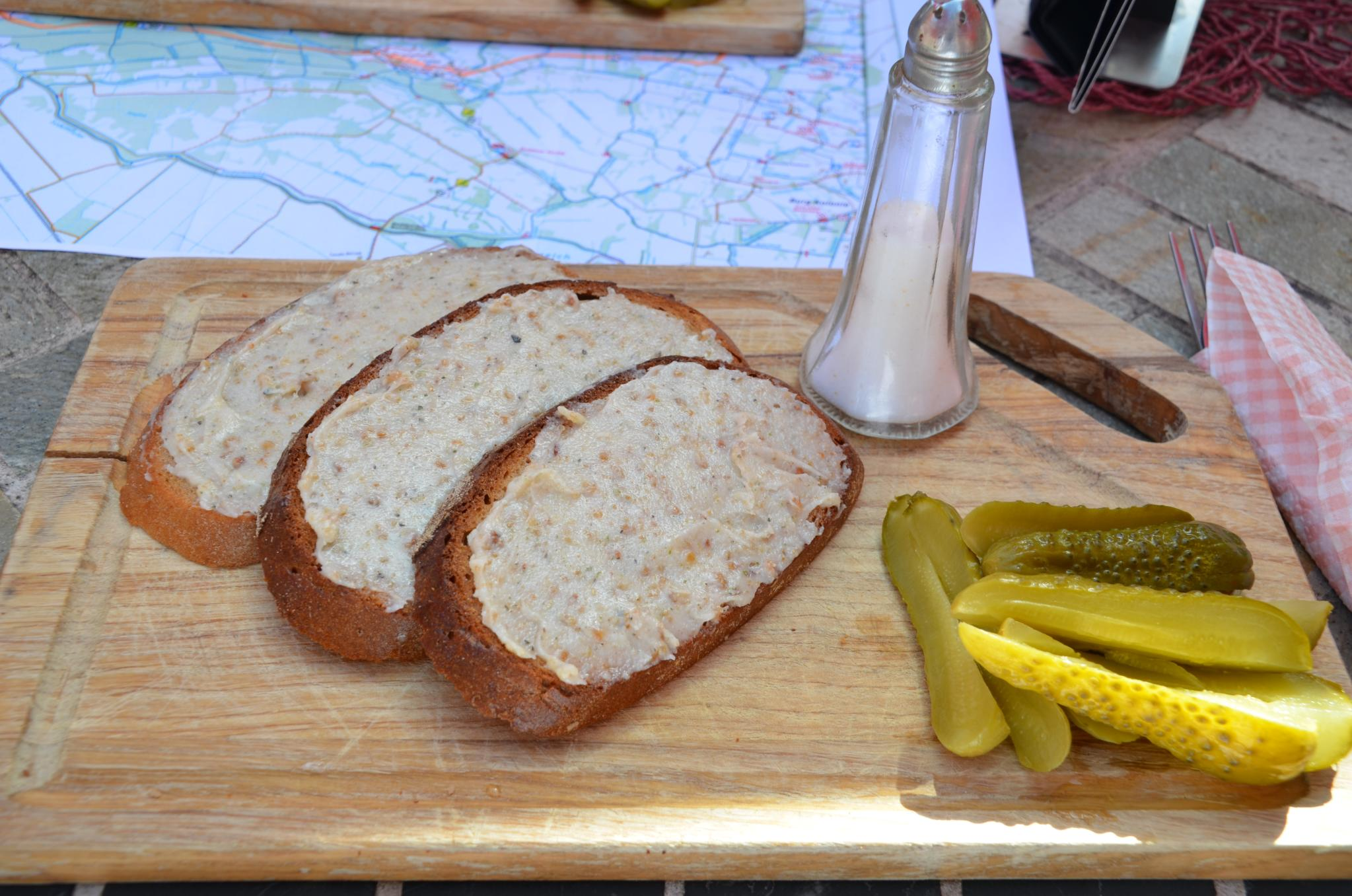 Spreewald Impressionen - Brot mit Griebenschmalz dazu saure Gurken